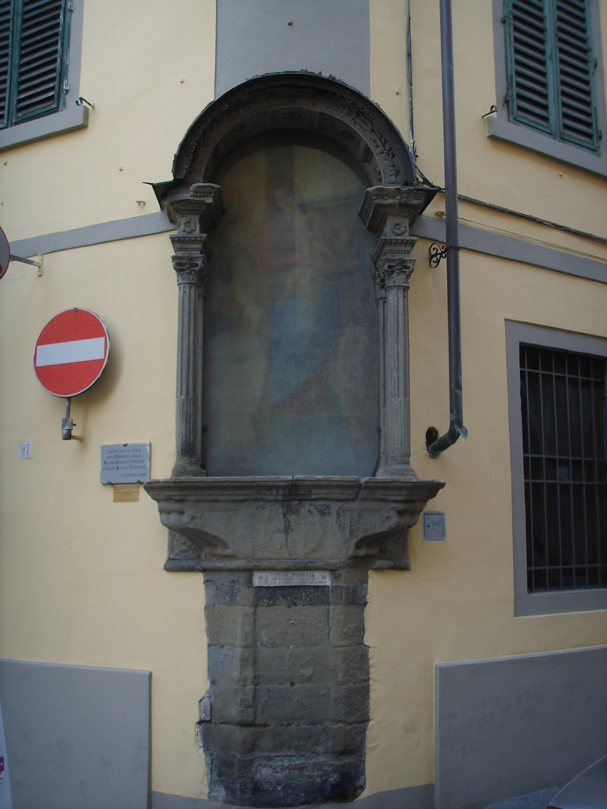 Tabernacolo di domenico puligo, santa caterina d'alessandria e san pietro martire